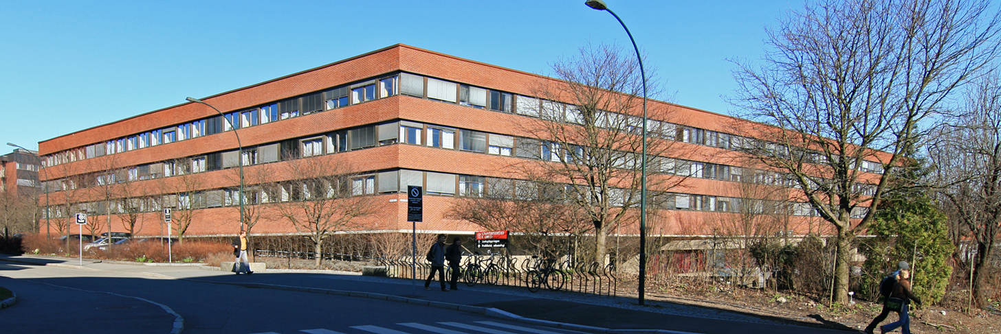 Kristine Bonnevies hus (biologibygget), Universitetet i Oslo.